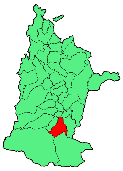 Aipaturiko udalerriaren kokapena Zuberoan